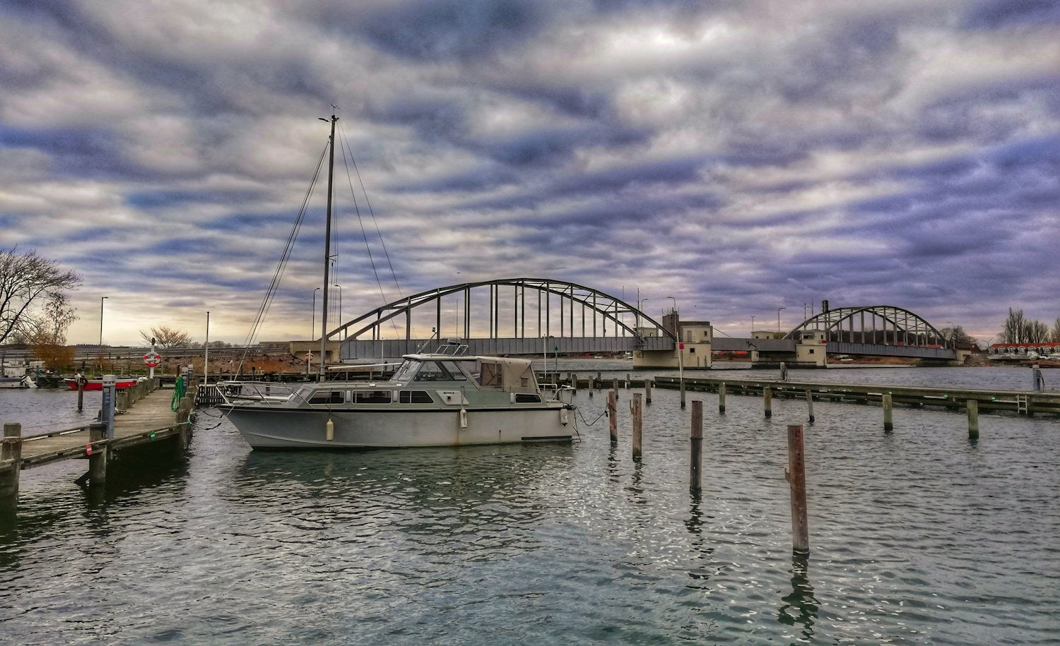 Guldborgsund Bridge in Denmark